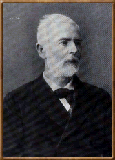 Nagy Iván (1824– 1898) az egyik legnagyobb hatású magyar genealógus, heraldikus, történész.